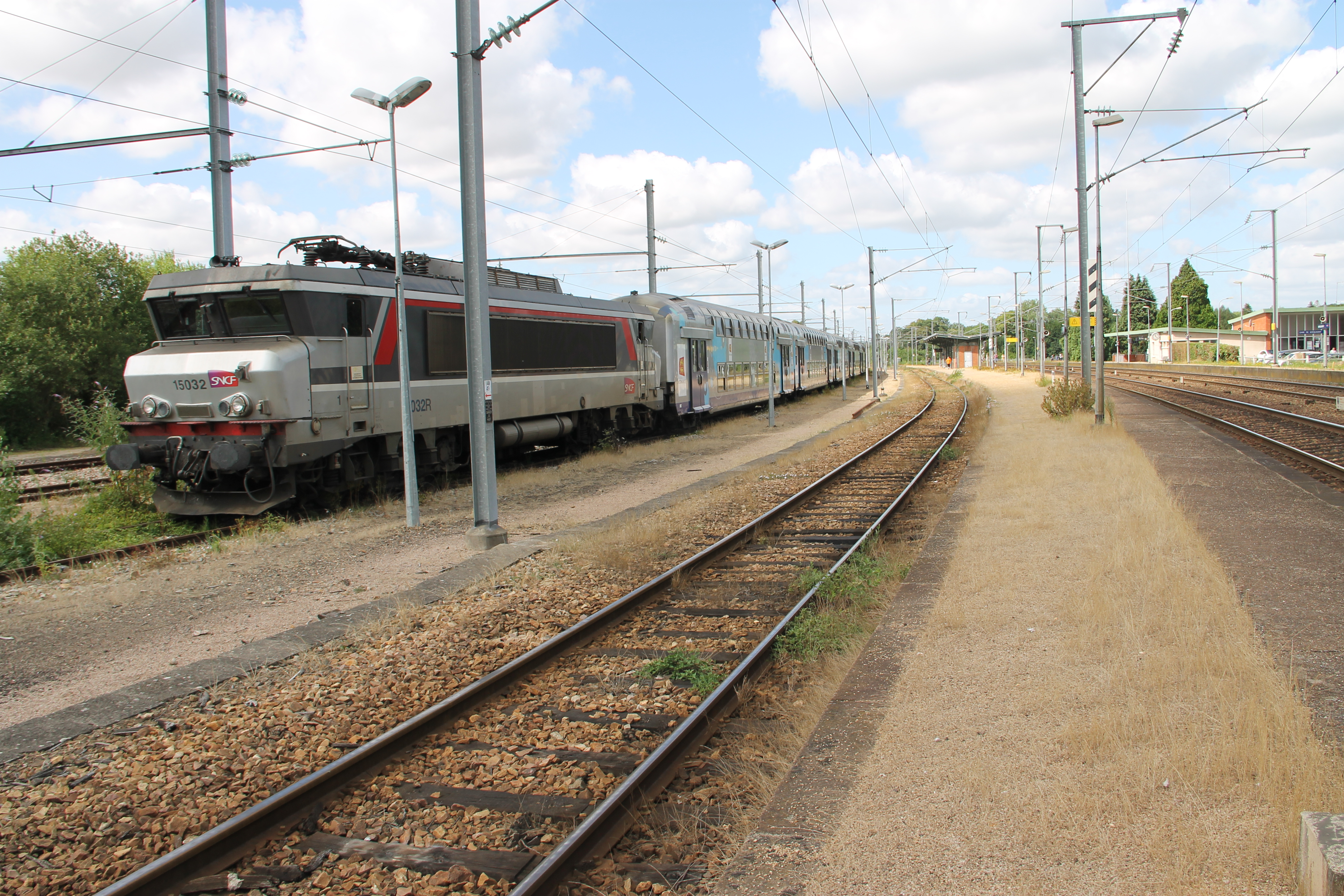 Rame TER Normandie sur une voie de garage de la gare de Serquigny, département de l'Eure, France.